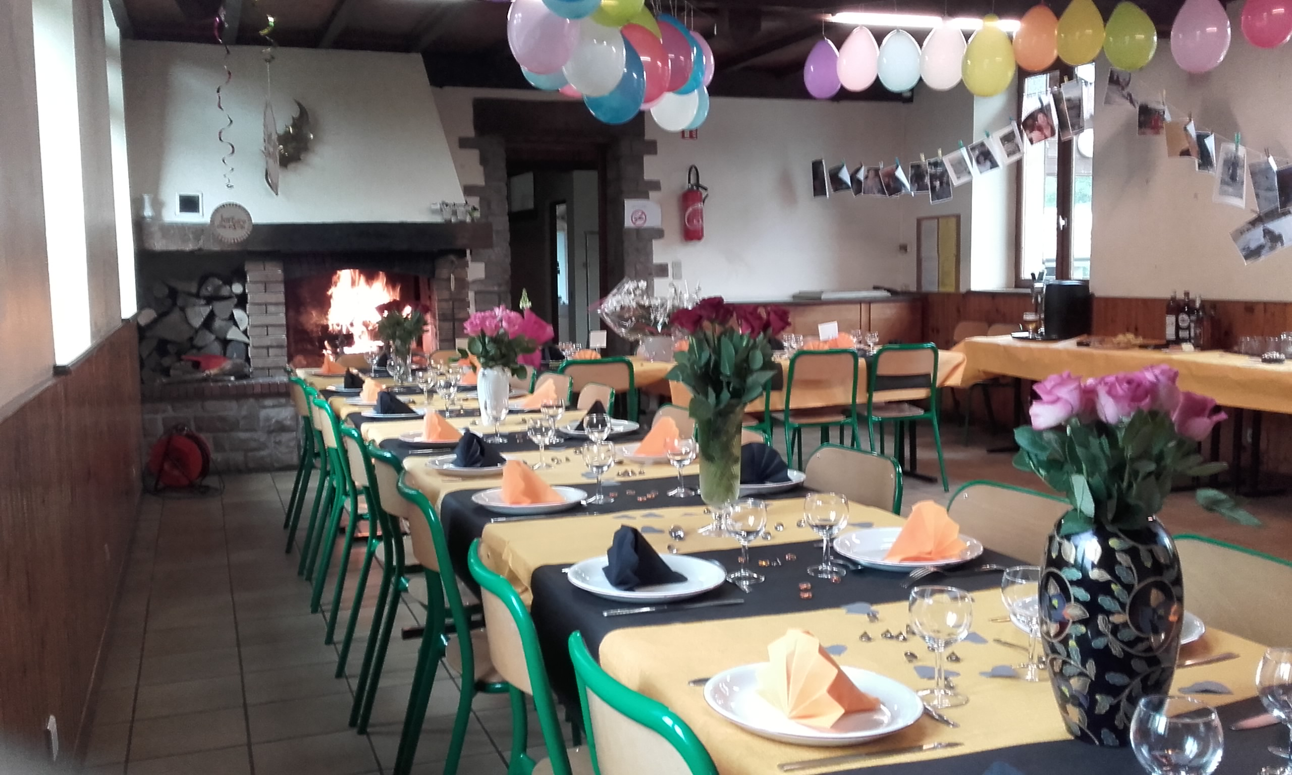 Vosges, 88290 Saulxures-sur-Moselotte, Gîte des Récés du Club vosgien, 3390 route de l'Envers du Rupt de Bâmont. Grâce au Club vosgien qui a racheté à la commune l'ancienne école du hameau du Rupt-de-Bâmont, pour en faire un gîte, le bâtiment accueille régulièrement des groupes pour l'organisation de leur manifestation familiales, sportives, les rencontres culturelles, l'accueil des randonneurs,...